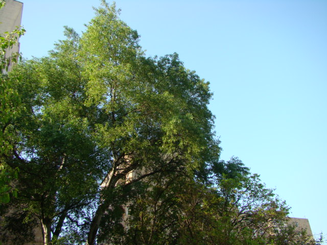 Bakının Yasamal rayonunun Əhməd Cəmil küçəsindəki uzunömürlü çinar ağacı